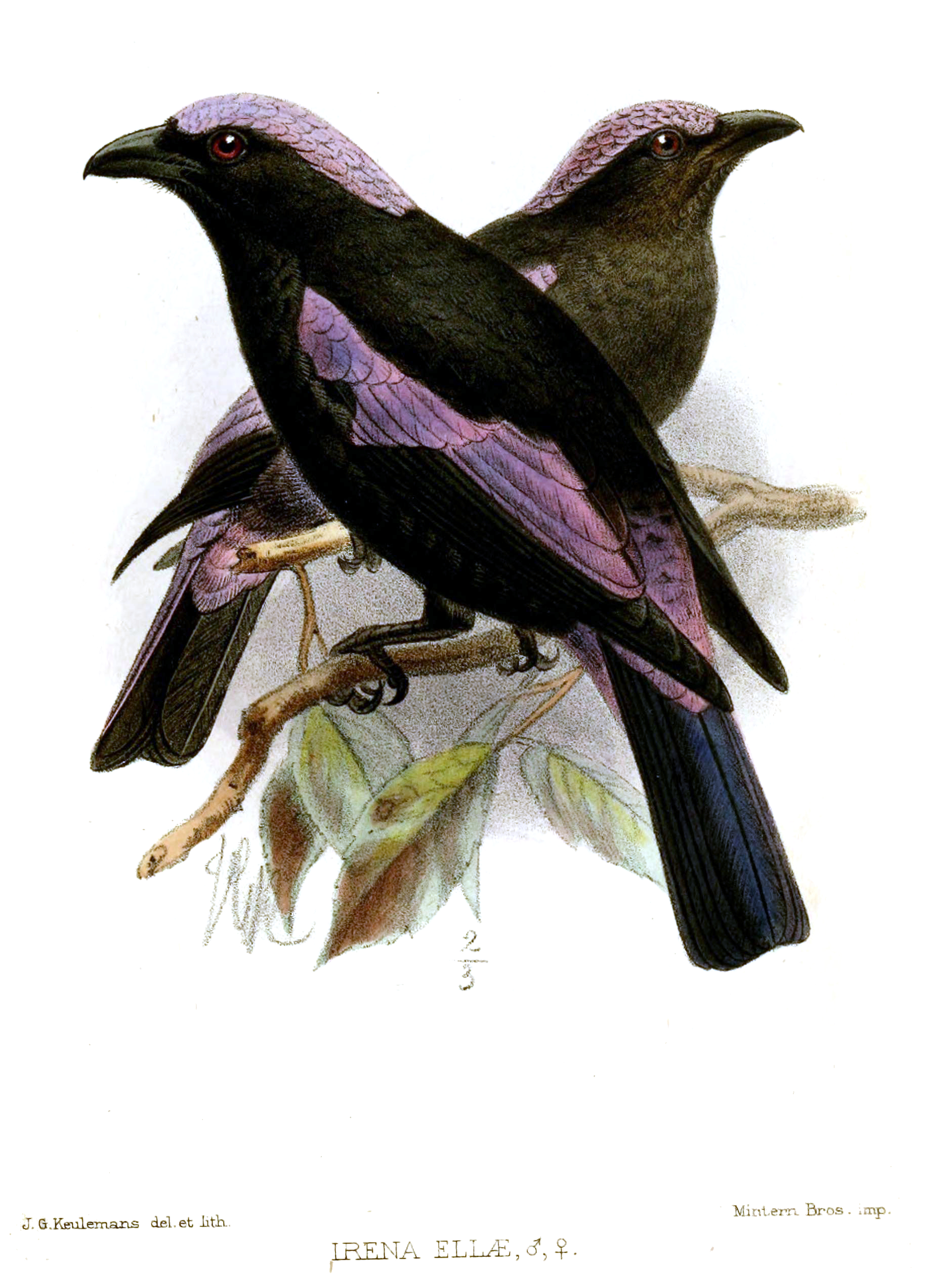 Irena cyanogaster ellae